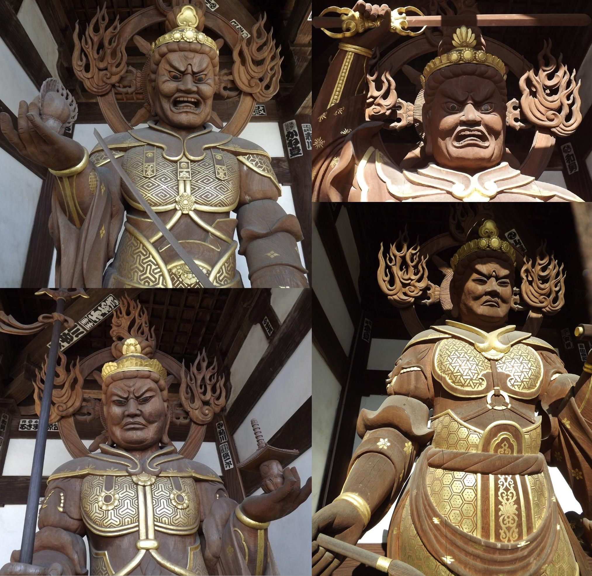 南光坊の四天王